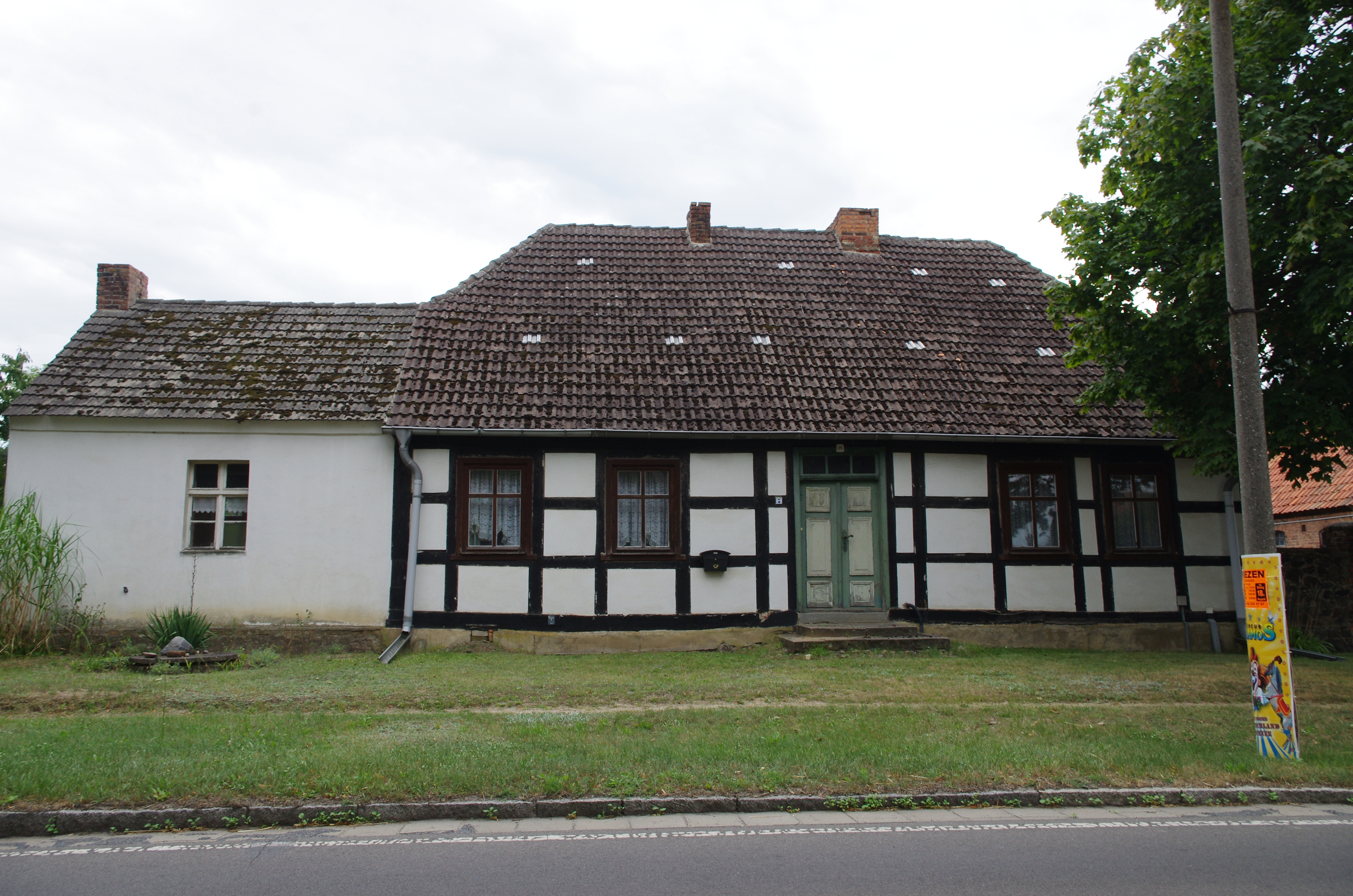 Wriezen in Brandenburg. Das Haus in der Straße Rathsdorf 25 steht unter Denkmalschutz.